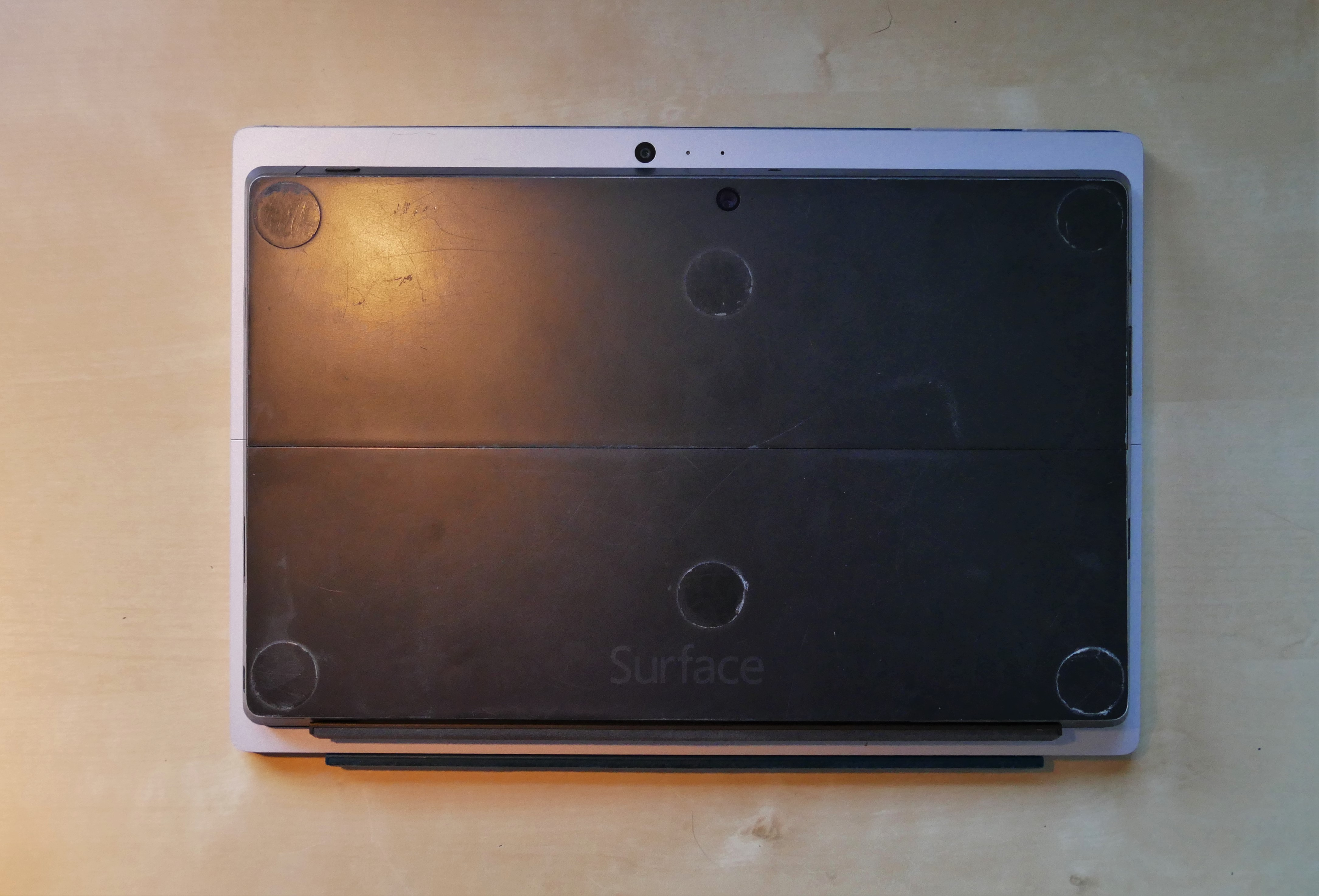 Microsoft Surface Pro 2 (10,6 Zoll) und Surface Pro 4 (12,3 Zoll) Größenvergleich